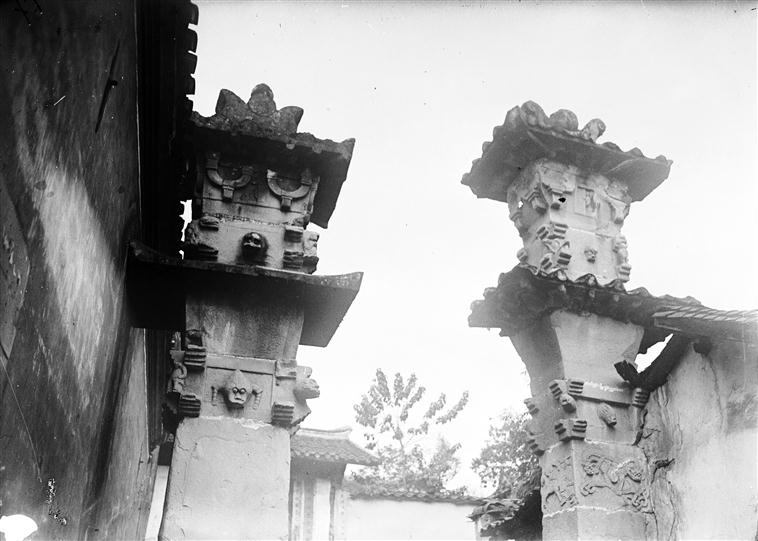 中文（台灣）: 法國人約翰 拉蒂格 1923年3月17日拍攝的忠縣巴王廟丁房雙闕照片